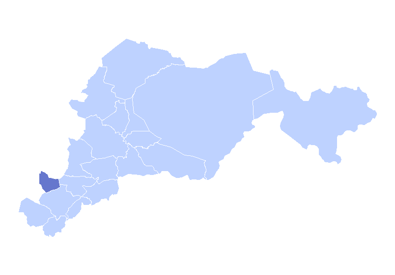 Położenie gminy Yauyupe na mapie departamentu El Paraiso